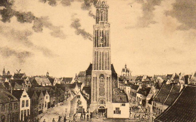 Peperbus